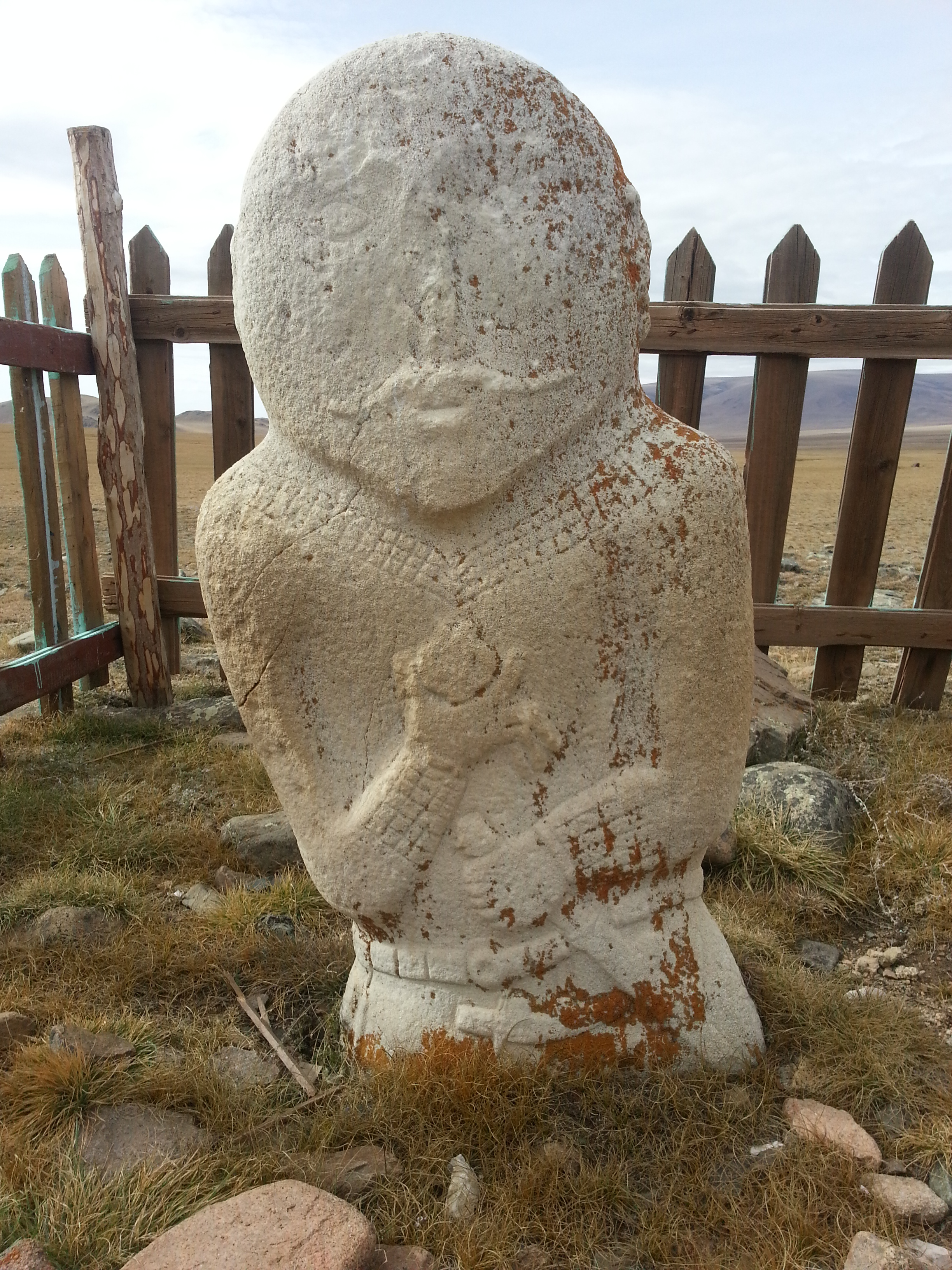 Монгол: Бумбатын амны тахилын байгууламжийн хүн чулуун хөшөө ур хийцийн хувьд бусдаасаа нэлээд онцлог дээл өмсгөлийн нэгэн өвөрмөц төрөл бүхий дүрслэгдсэн цөөн хөшөөдийн нэг юм.